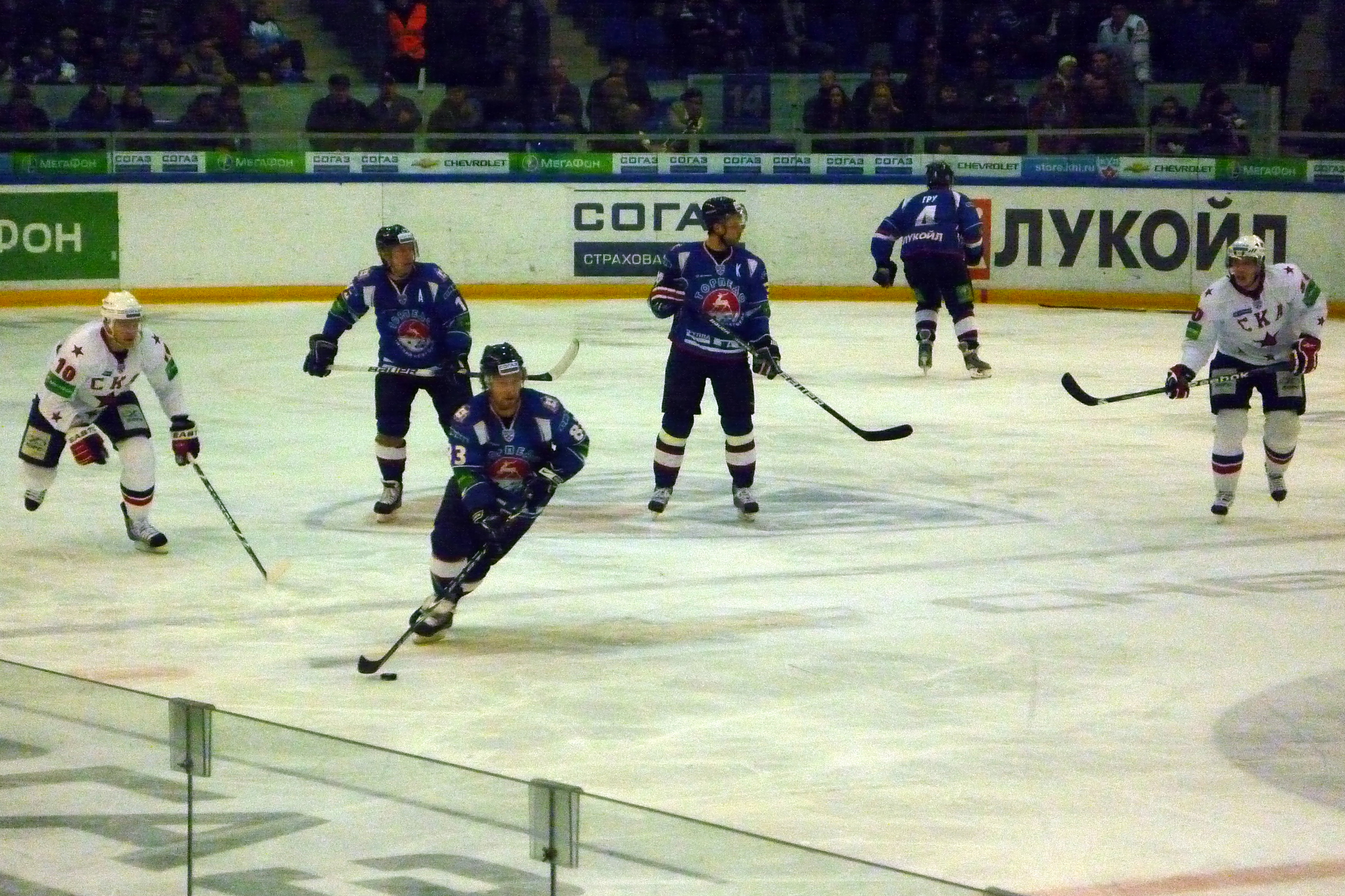 Нападающий нижегородского «Торпедо» Мэтт Эллисон атакует в матче против питерского СКА 12 декабря 2010 года